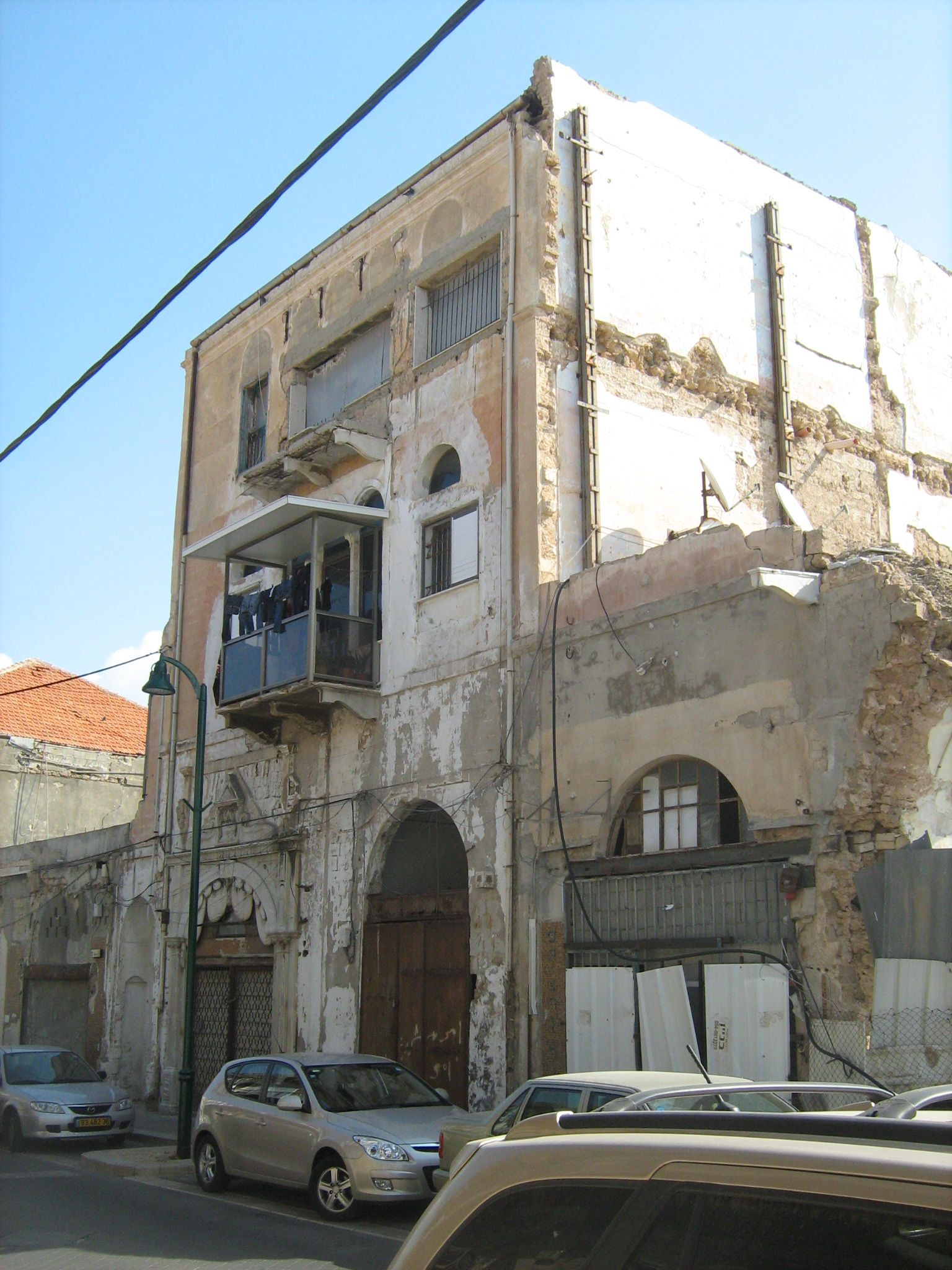 רזיאל 15